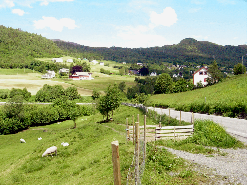 Ørskog and the Vaksvik